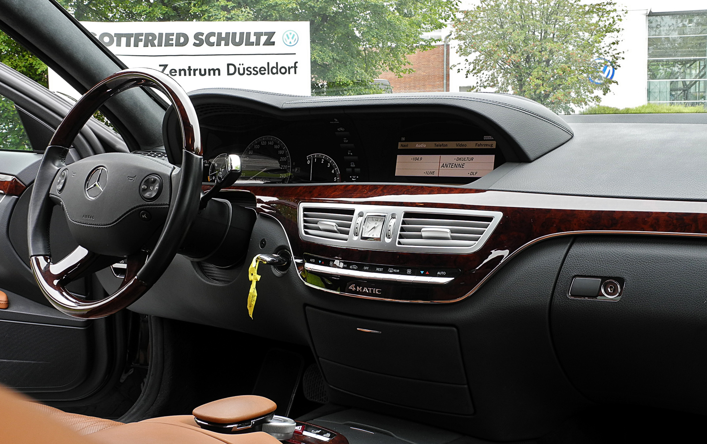 Mercedes-Benz S 320 CDI 4MATIC L (V 221)